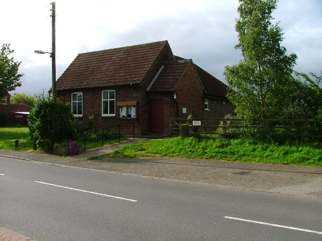 Village Hall, Hilton, nr Stockton-on-Tees